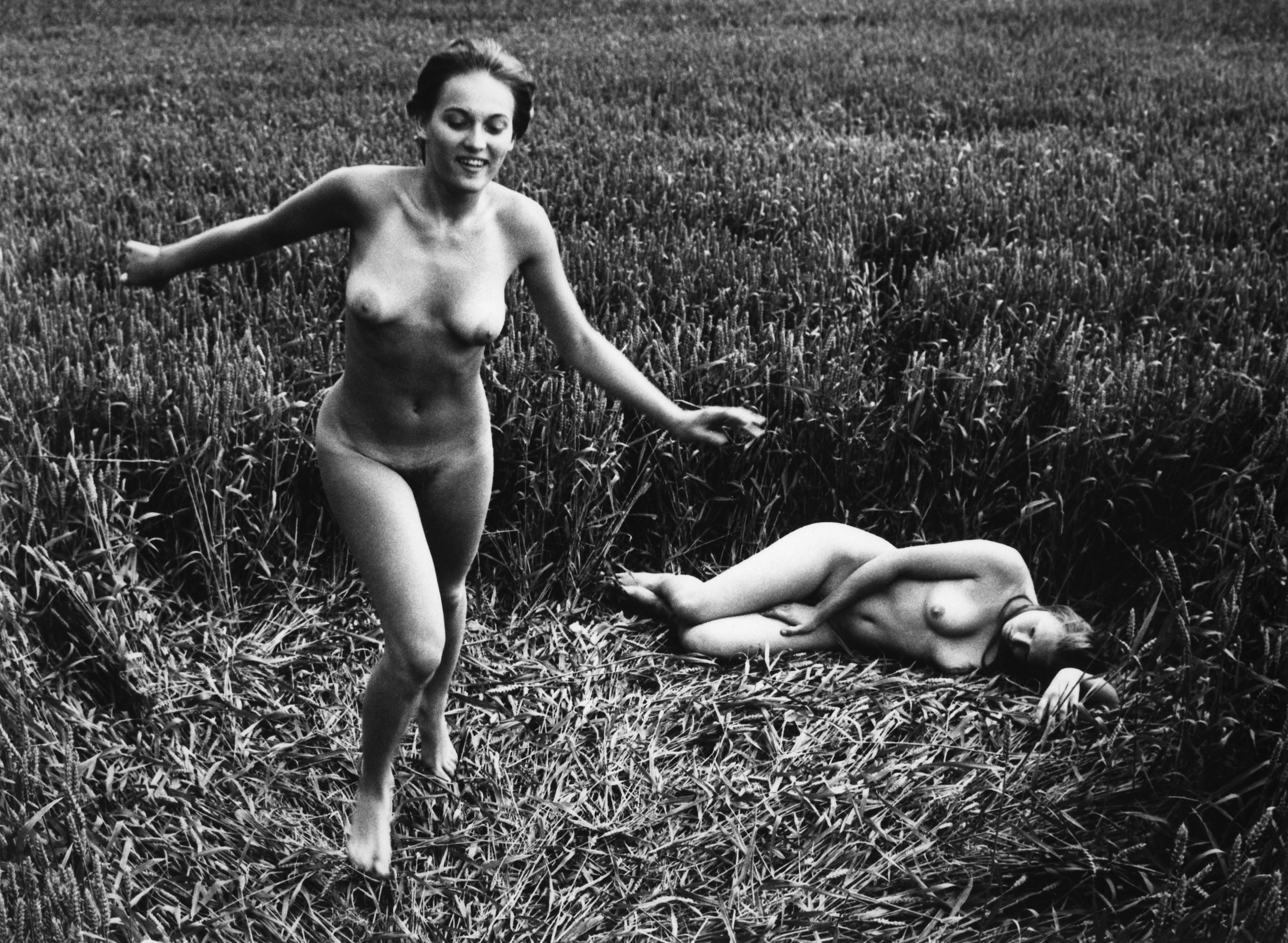 František Dostál - AKT